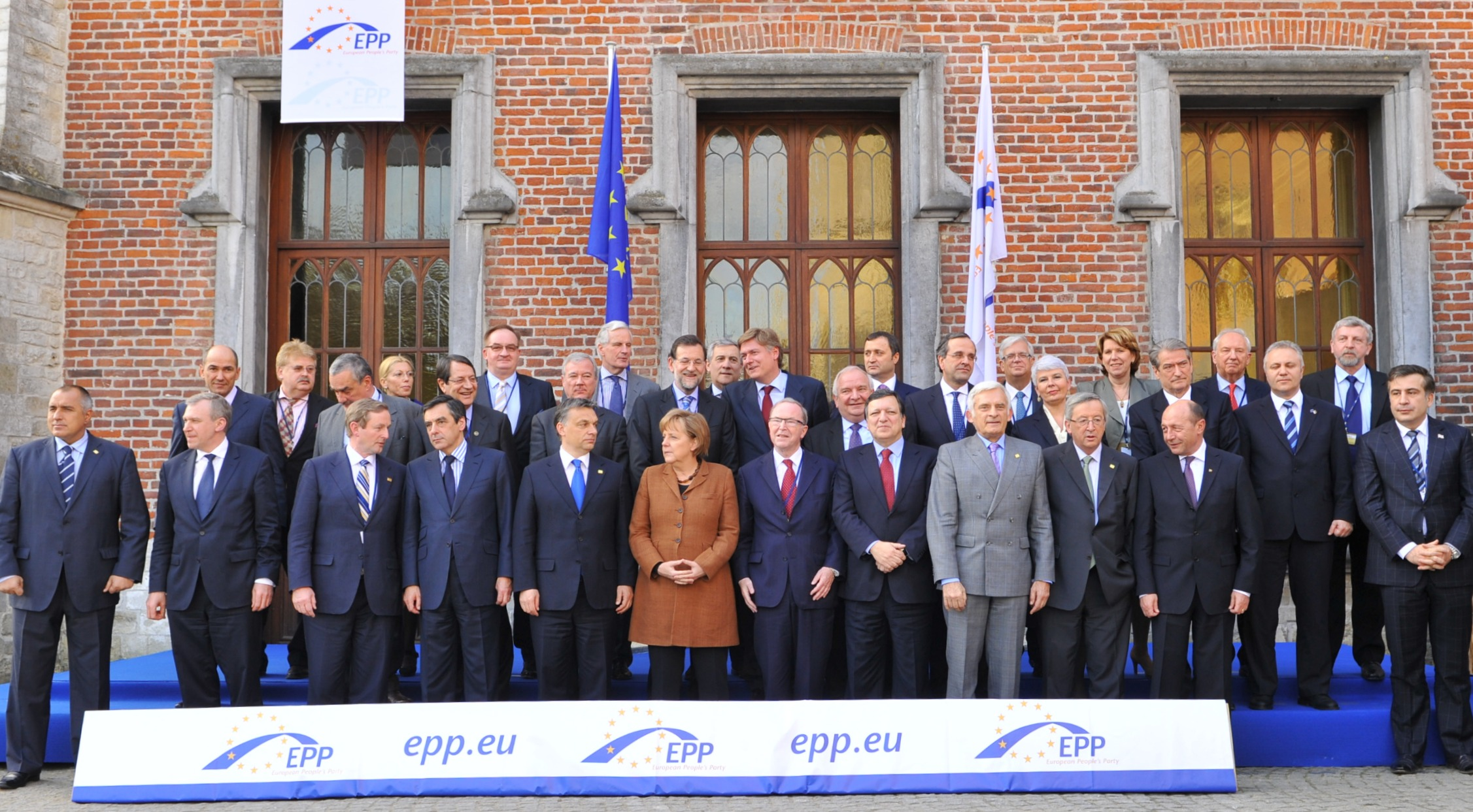 EPP Summit March 2011